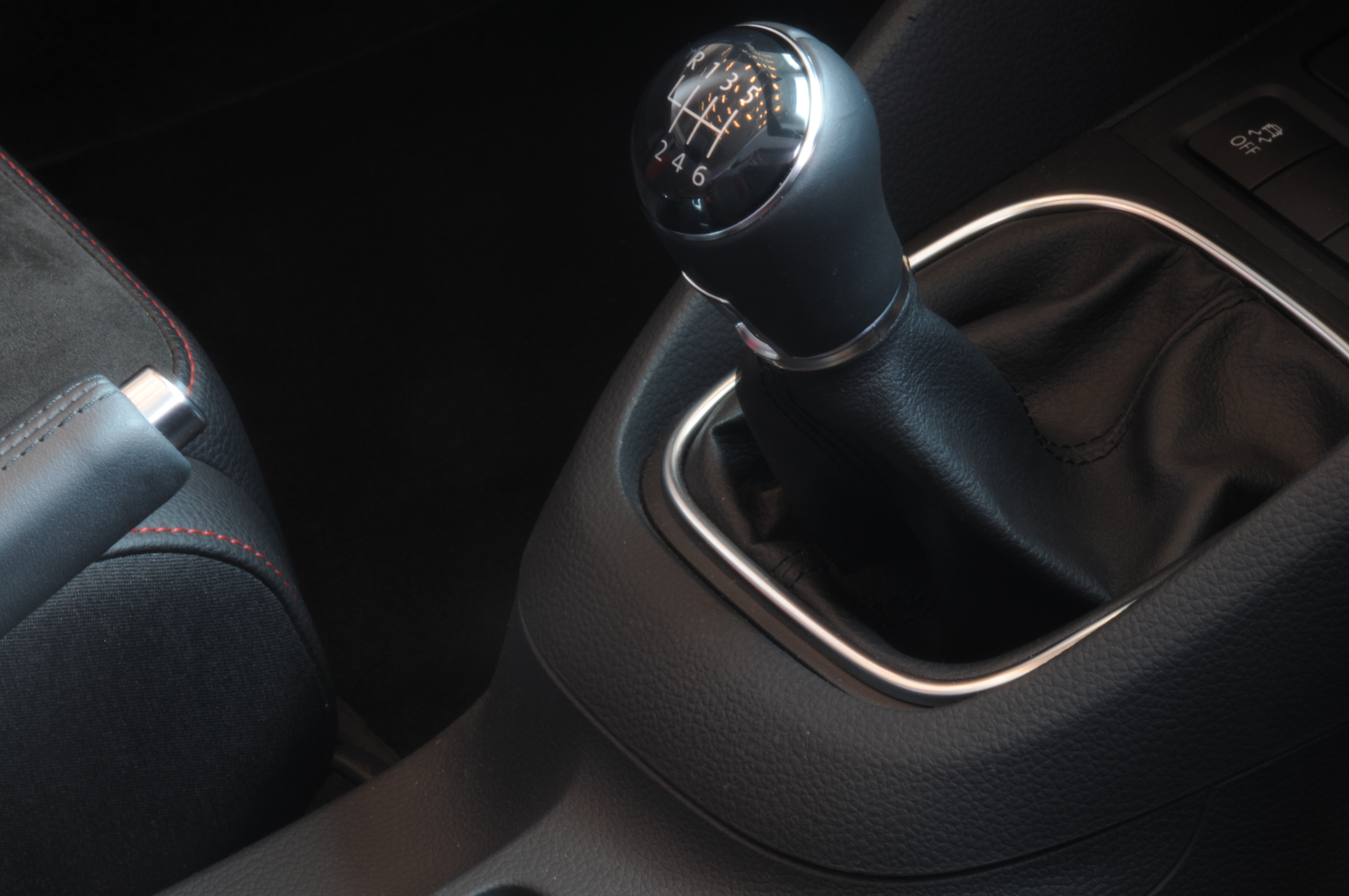 Detail Volkswagen